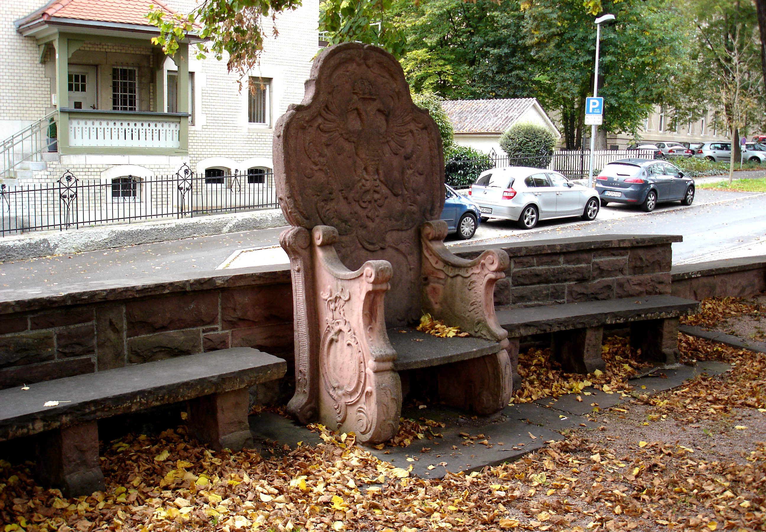 Königsstraße nahe Landgericht